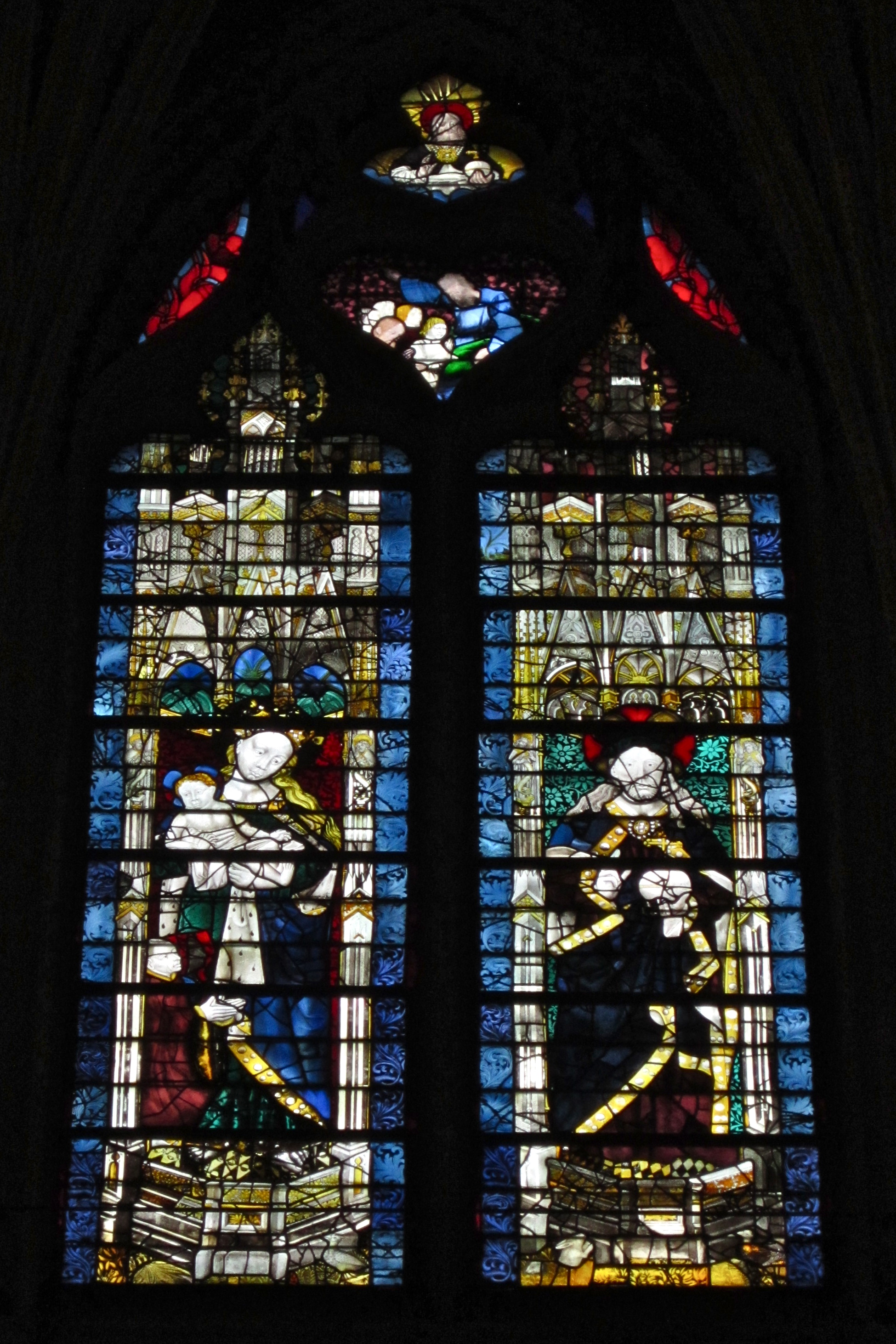 Mittelfenster des Hochchors in Saint-Séverin in Paris, 15. Jhd.